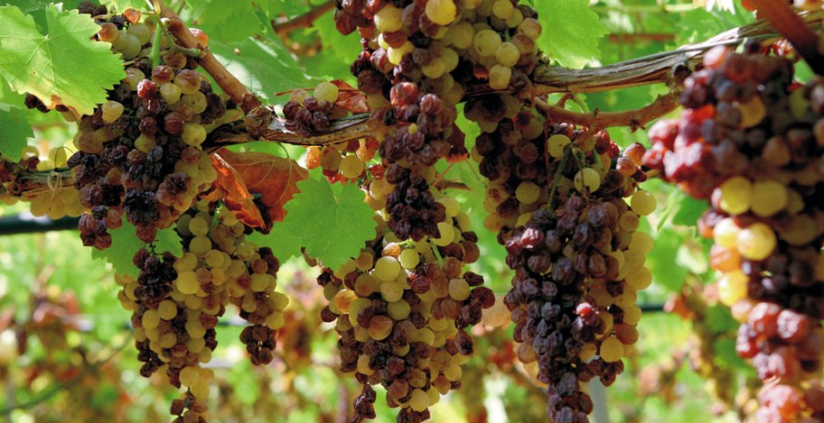 Dicasi lo stesso per questa foto.